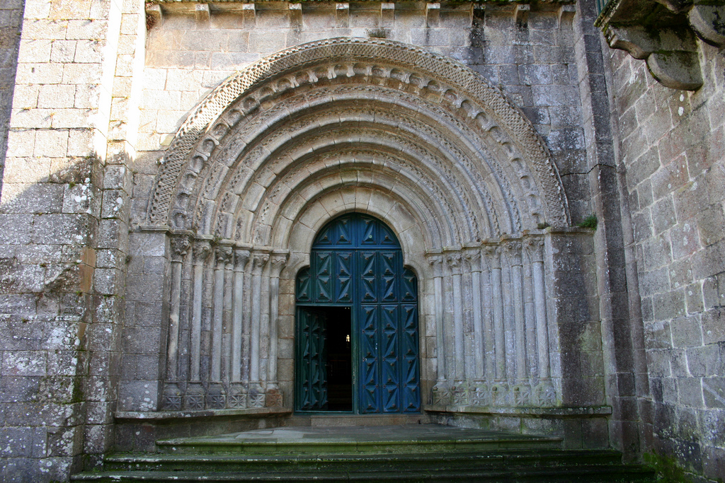 Pórtico do Mosteiro da Armenteira, concello de Meis O mosteiro de Santa María de Armenteira é un mosteiro románico de transición, ou protogótico, que pertenceu desde a segunda metade do século XII á Orde do Císter. Deste xeito o seu estilo arquitectónico responde aos preceptos do Plano Bernardino baseado na austeridade formal e o rigor funcional. Sitúase na parroquia de Santa María de Armenteira, no concello pontevedrés de Meis.